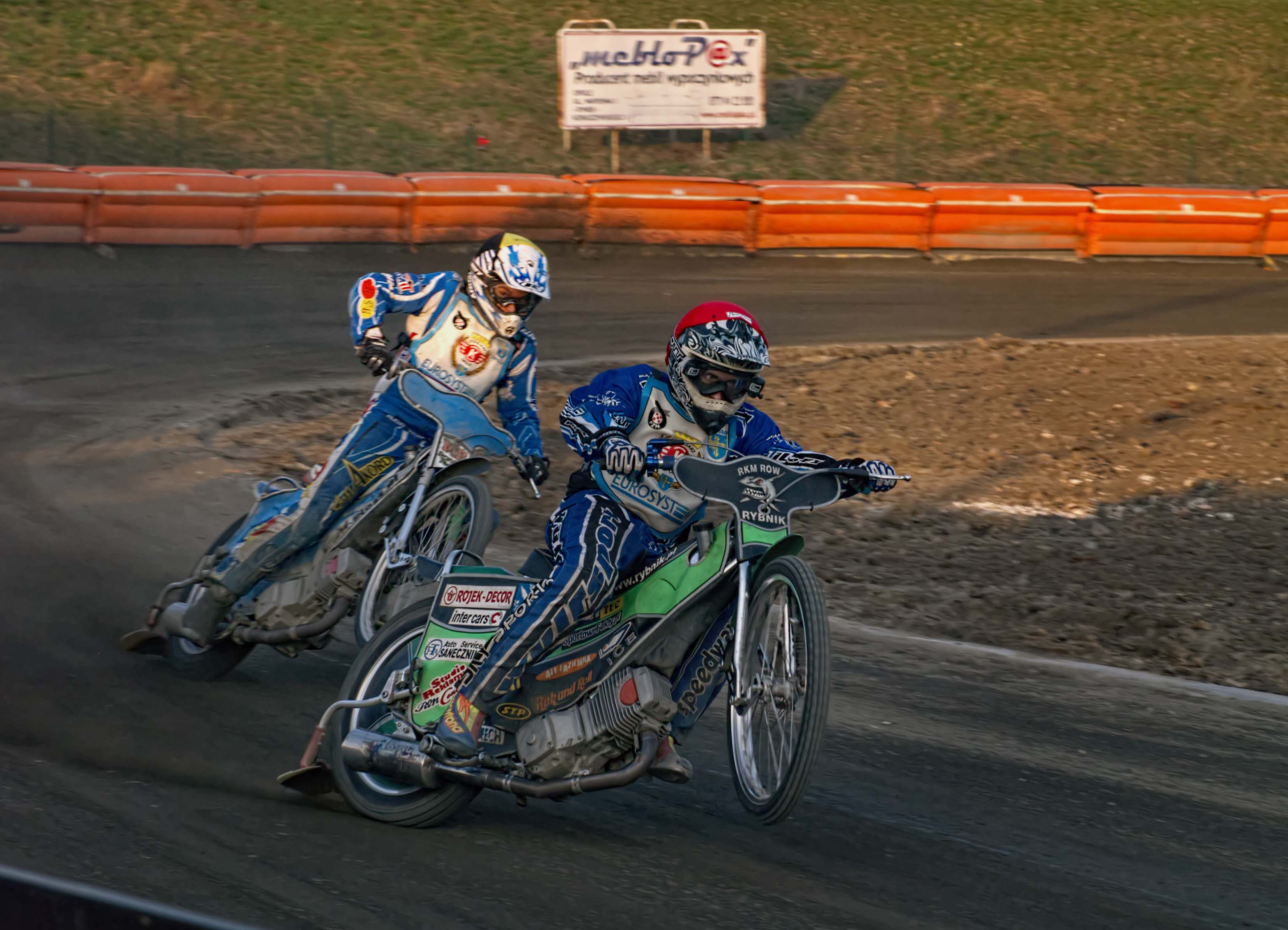 Kolejarz Opole vs Kolejarz Rawicz (26.03.2010)